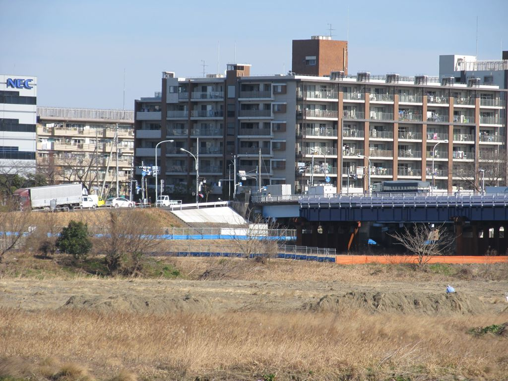 東京都道18号府中町田線。関戸橋北。東京都府中市